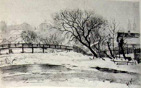 Беларуская (тарашкевіца): Менск (Miensk), Лавы (Łavy). Мост